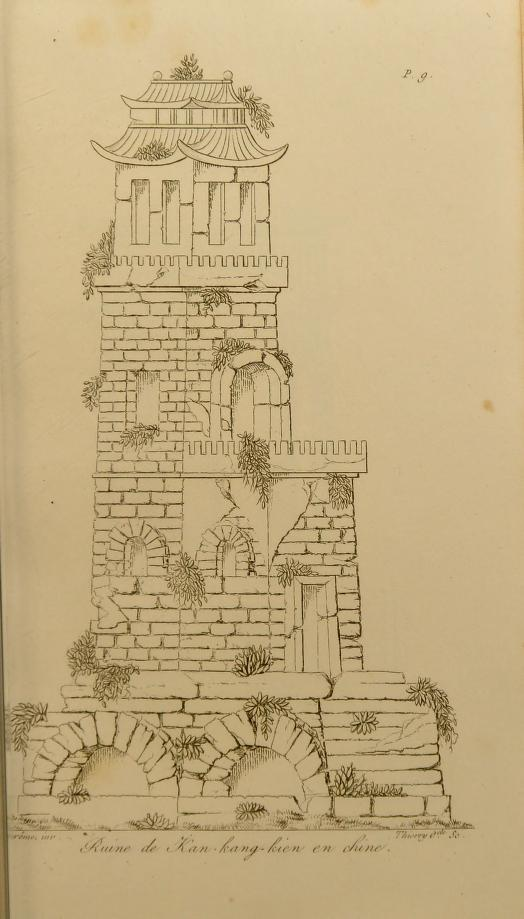 安東南‧卡漢姆的「裝置」藝術蛋糕設計圖樣